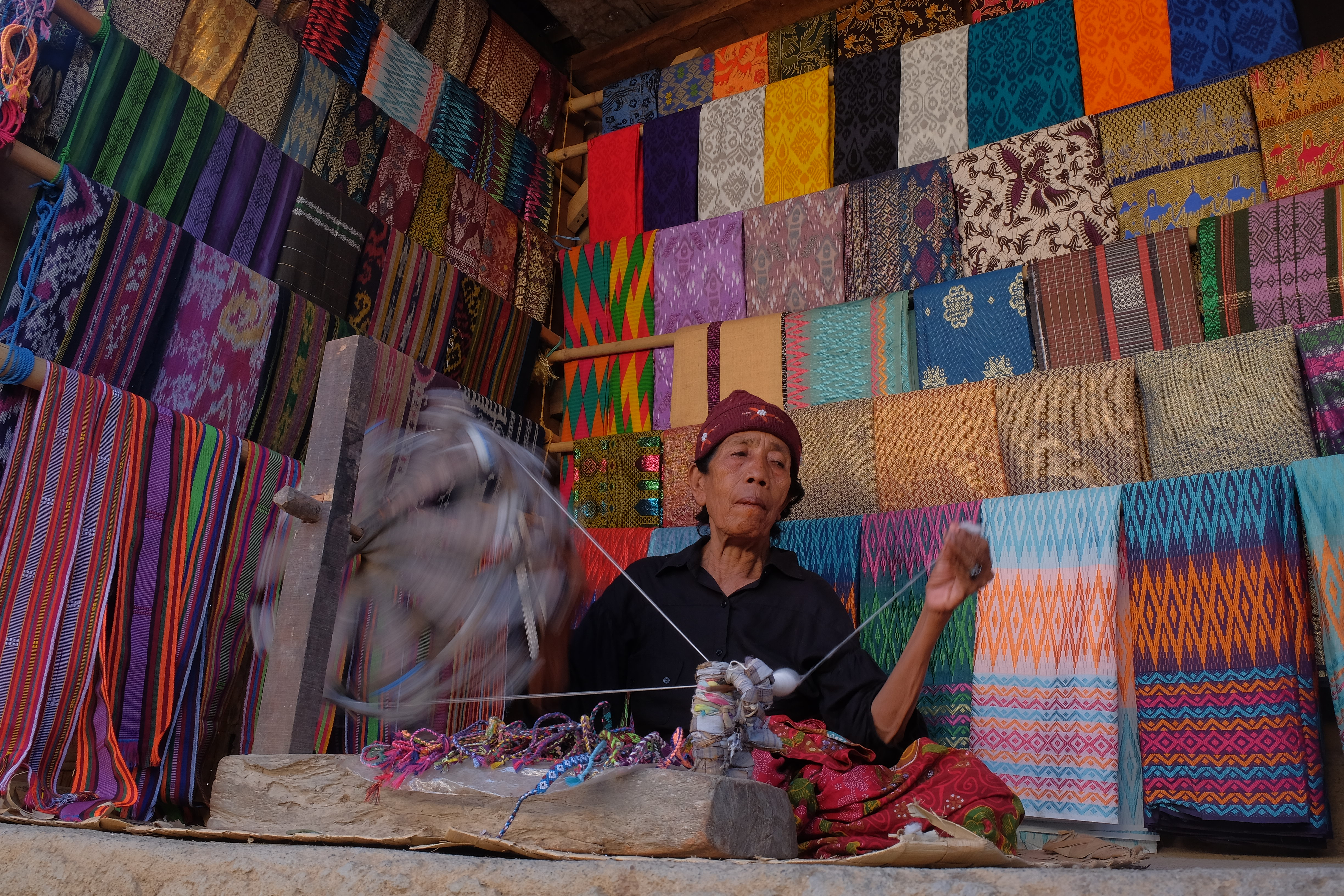 Pintal benang di Kampung Sade, Lombok. Pintal benang merupakan tradisi suku Sasak